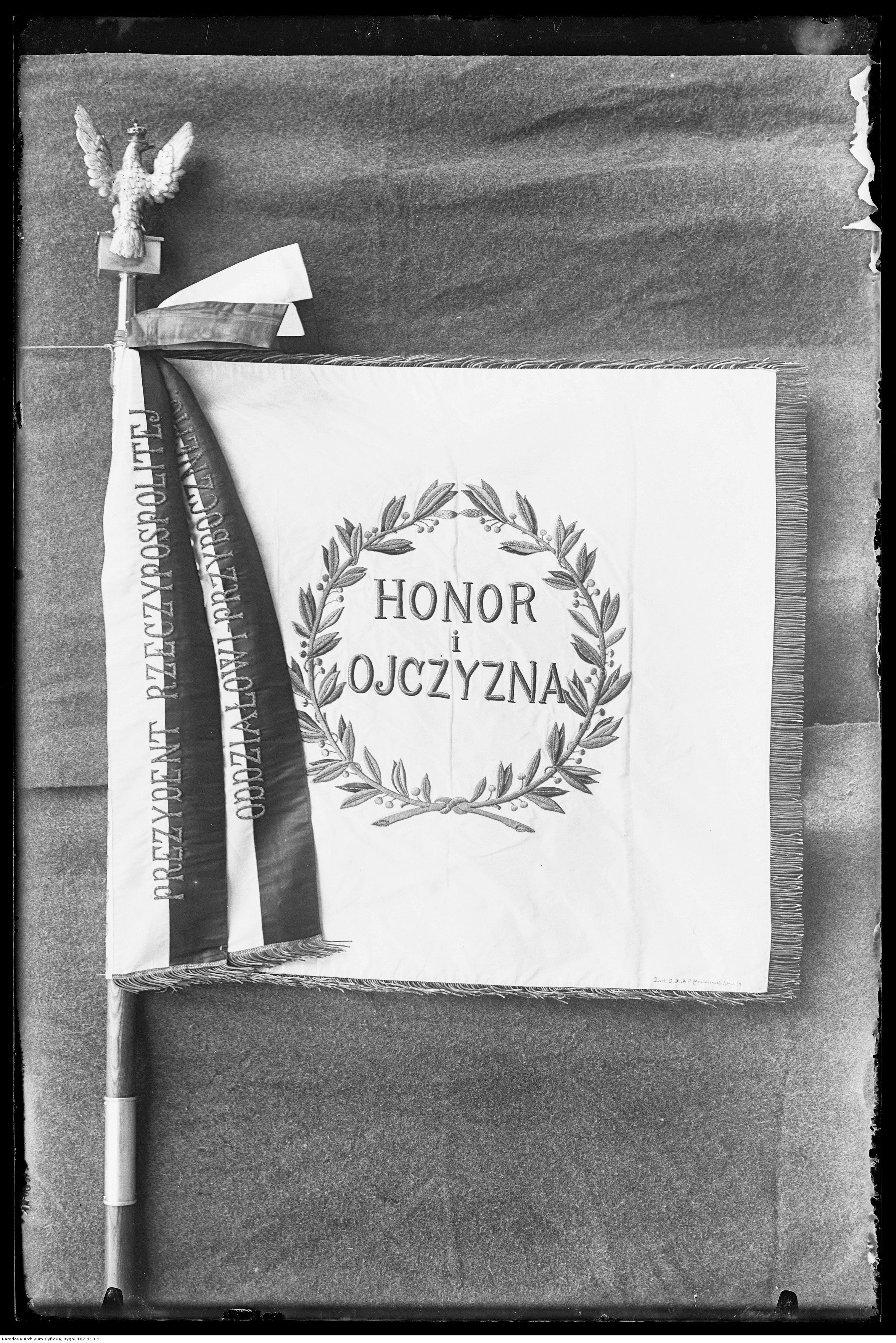 Lewa strona sztandaru z dewizą "Honor i Ojczyzna".